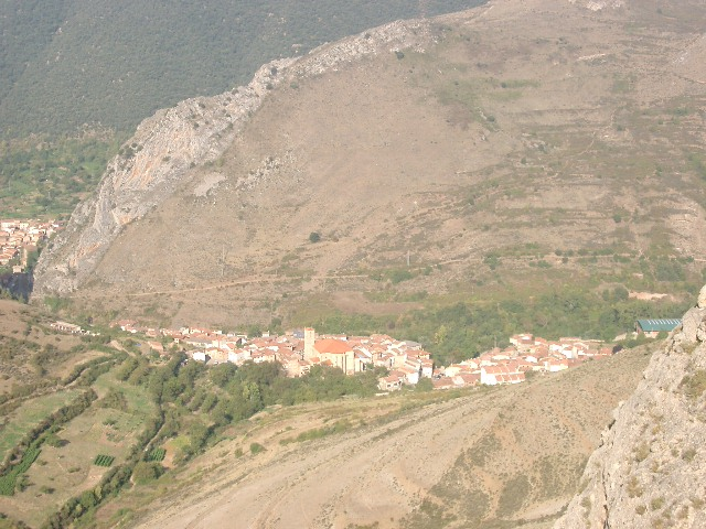 Vista de Anguiano desde el monte. En esta foto se ve el vello enclave del municipio